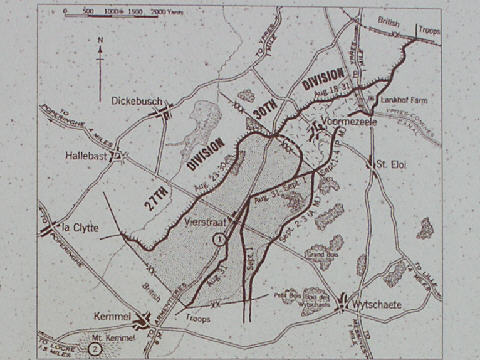 Az amerikai hadsereg térképe az I. világháborúból, a flandriai Kemmel-hegyen és környékén kialakított német és szövetséges állásokról. A térképen a 27. hadsoztály (amerikai) és 30. hadosztály (brit) szerepel (Flandria, Belgium)